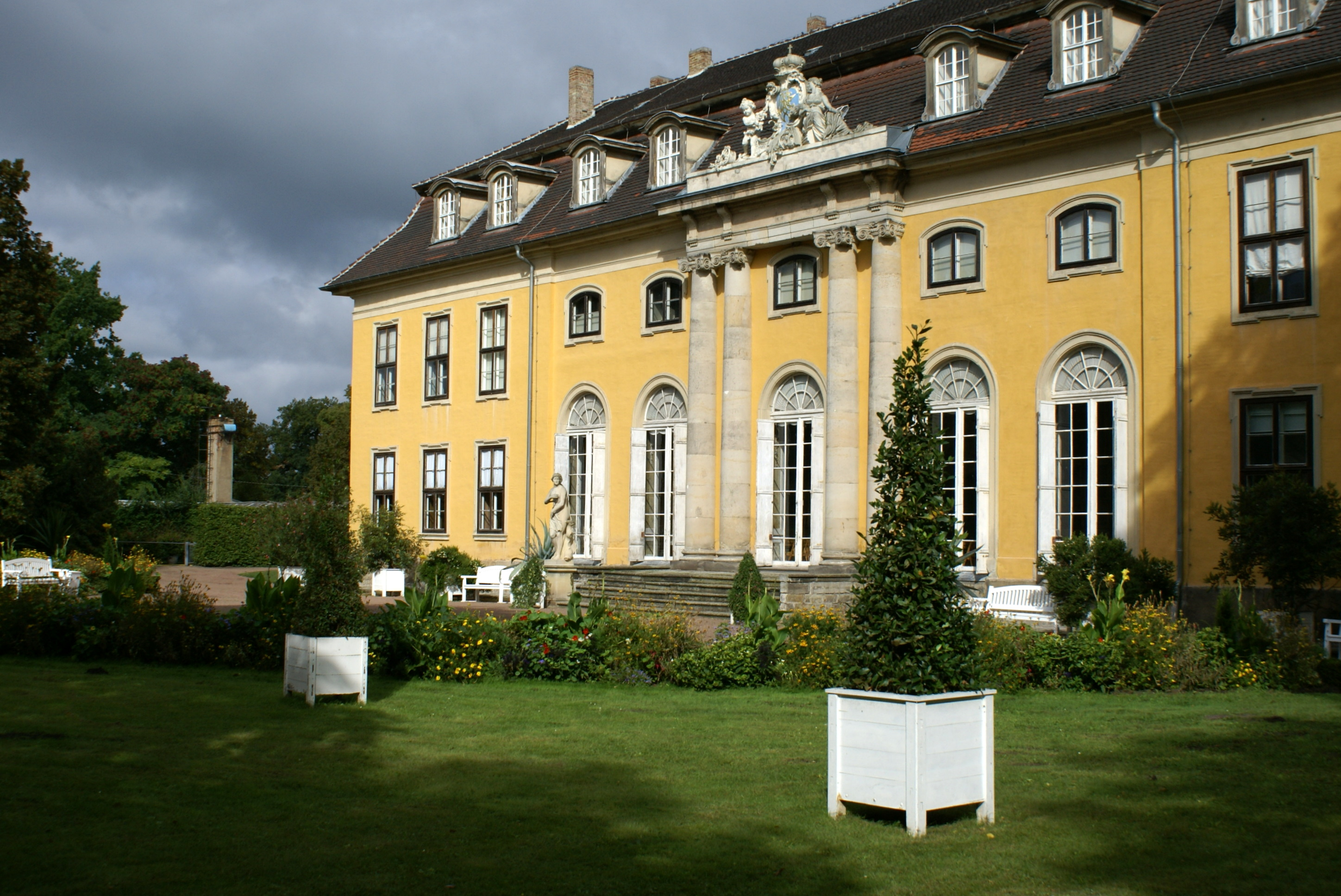 Schloss Mosigkau